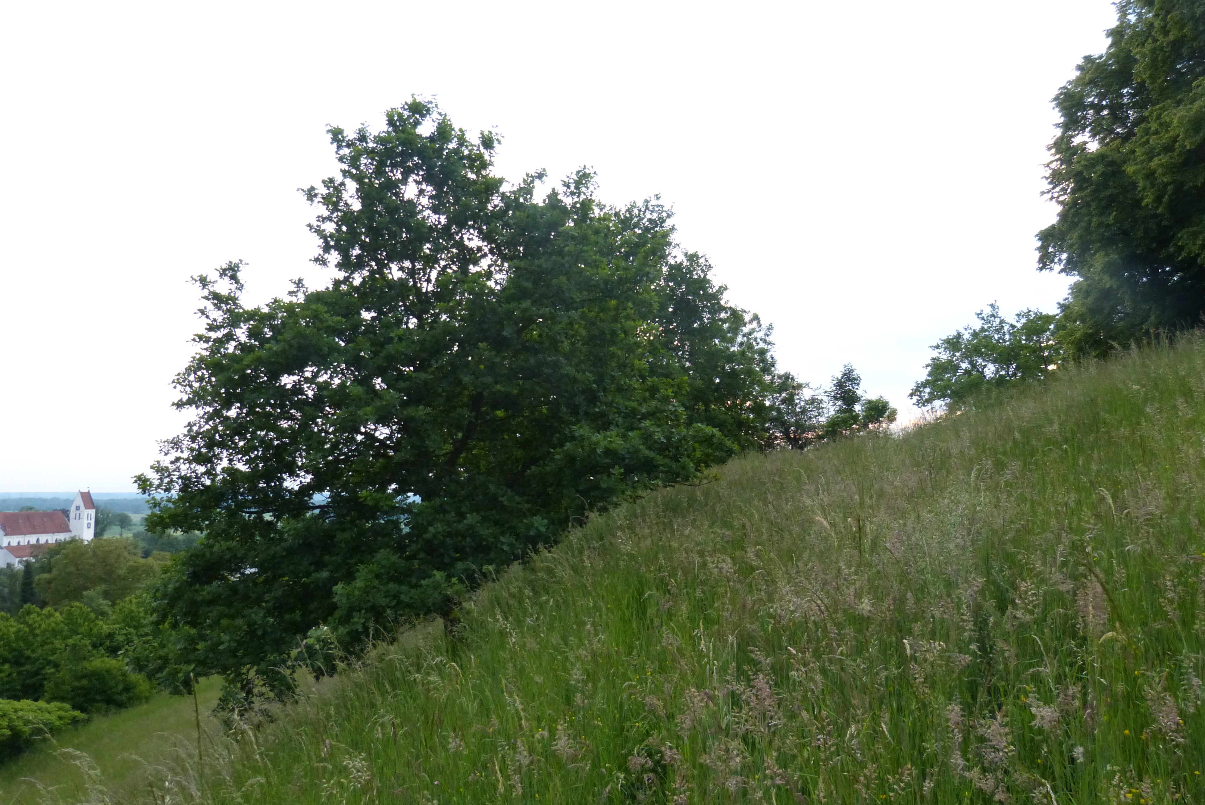 Landschaftsschutzgebiet Kreuzberg bei Thierhaupten, Landkreis Augsburg: Hang des Kreuzbergs.